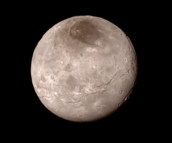 Charon widziany z sondy New Horizons podczas przelotu 14 lipca 2015.